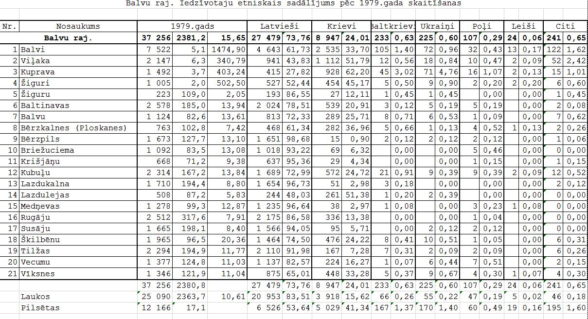 Latvijas 1979. gada tautas skaitīšanas dati